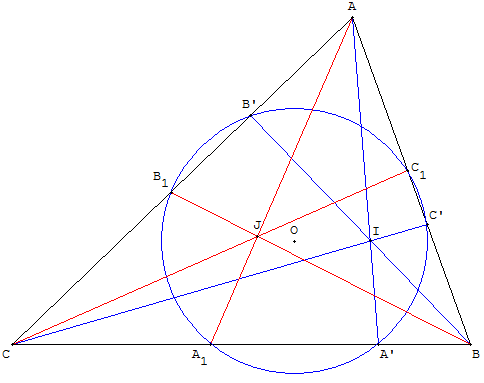 Théorème de Terquem